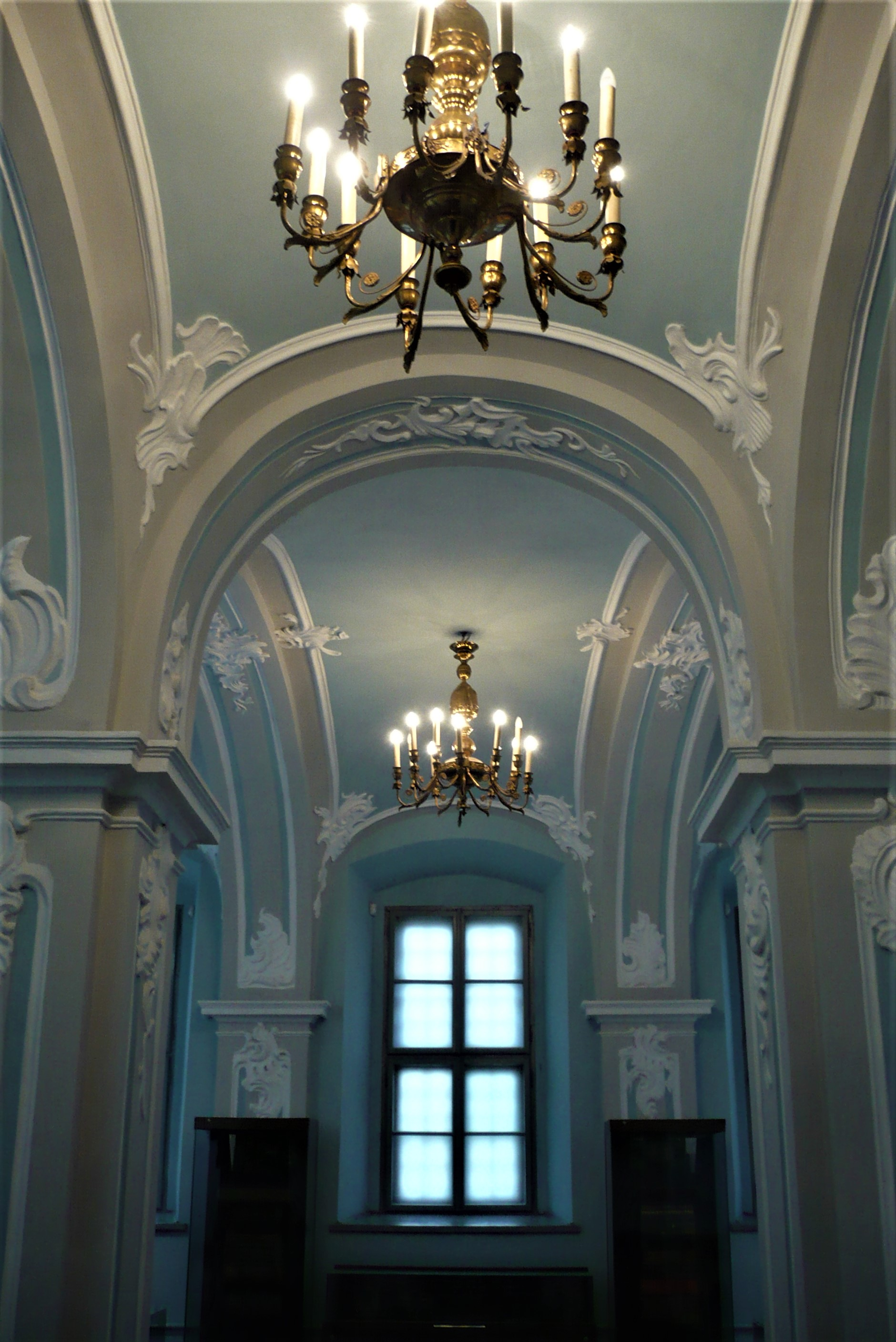 Klasztor dominikanów we Lwowie. Wnętrze